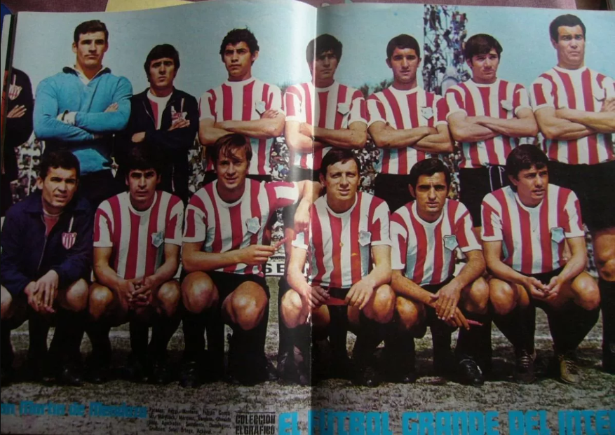 revista el grafico con San Martin del 69